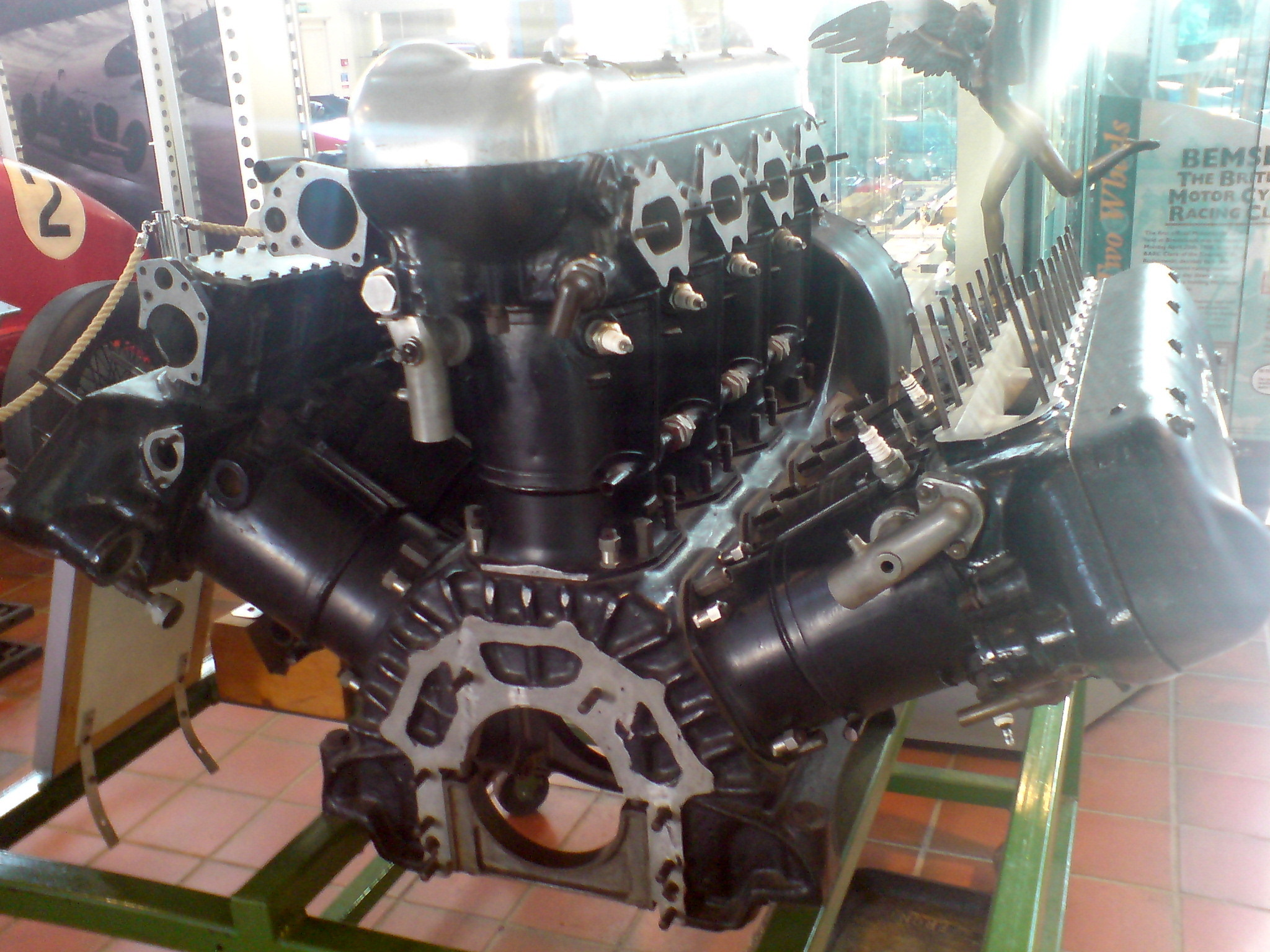 A Napier Lion W12 engine at Brooklands Museum